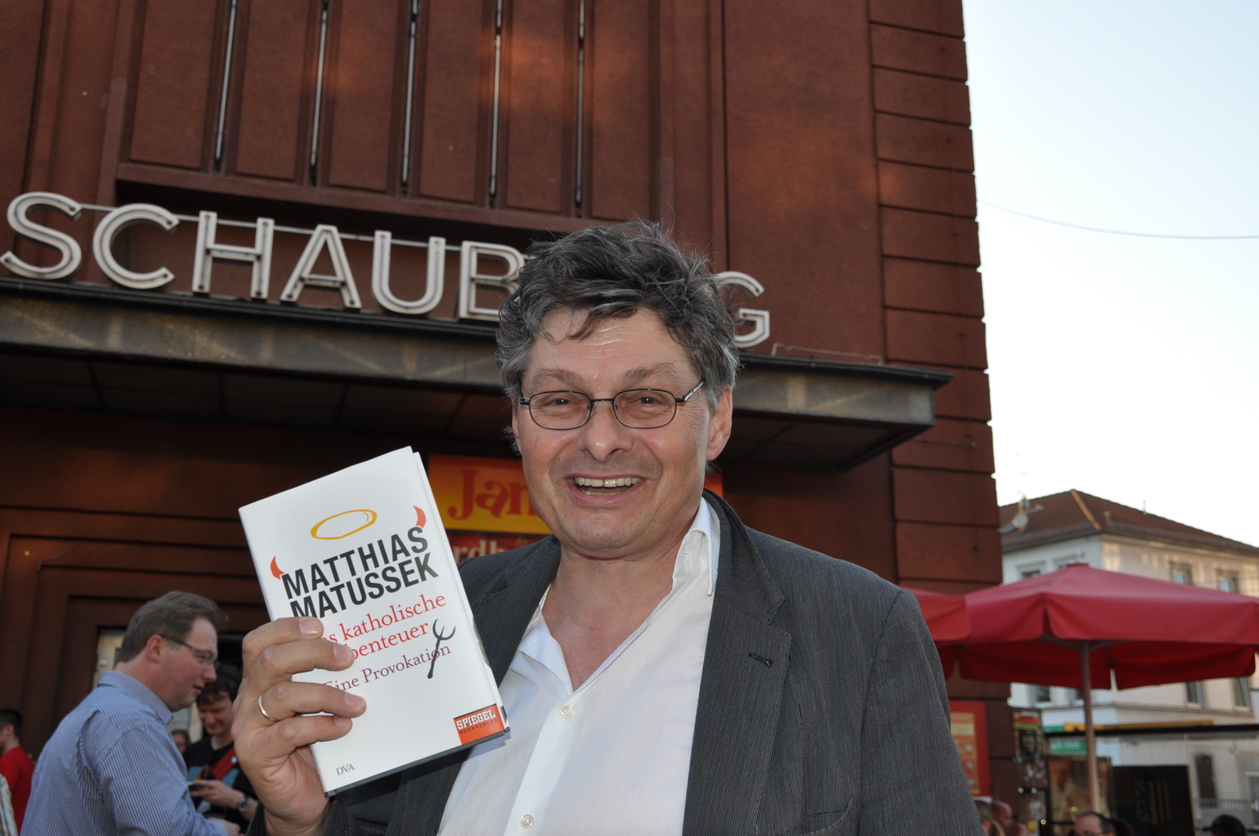 Matthias Matussek, Journalist und Buchautor, auf dem 33. Deutschen Evangelischen Kirchentag in Dresden vor der Schauburg, Juni 2011